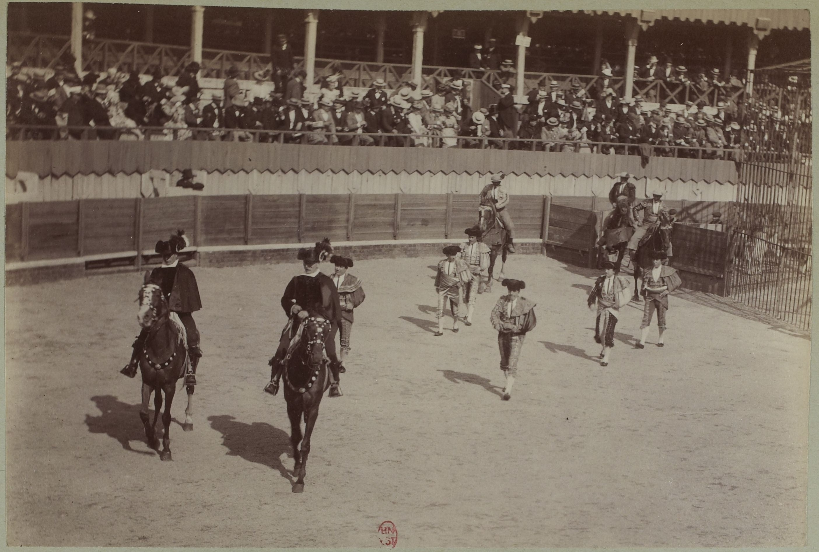 [Collection Jules Beau. Photographie sportive] : T. 9. AnnÃ©e 1899 / Jules Beau : F. 47v. [ArÃ¨ne de Roubaix]